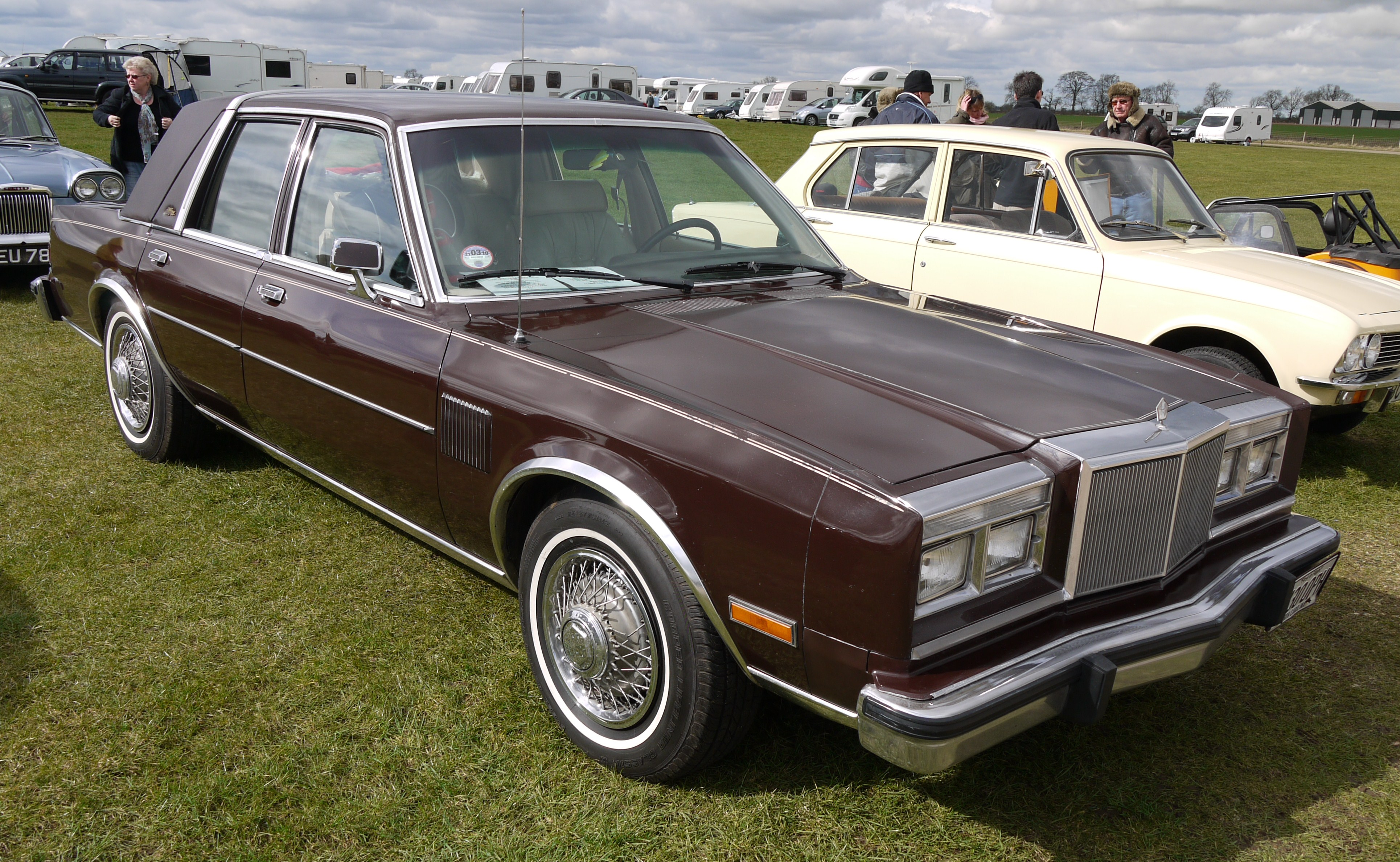 Panasonic G1 14-45 Lens